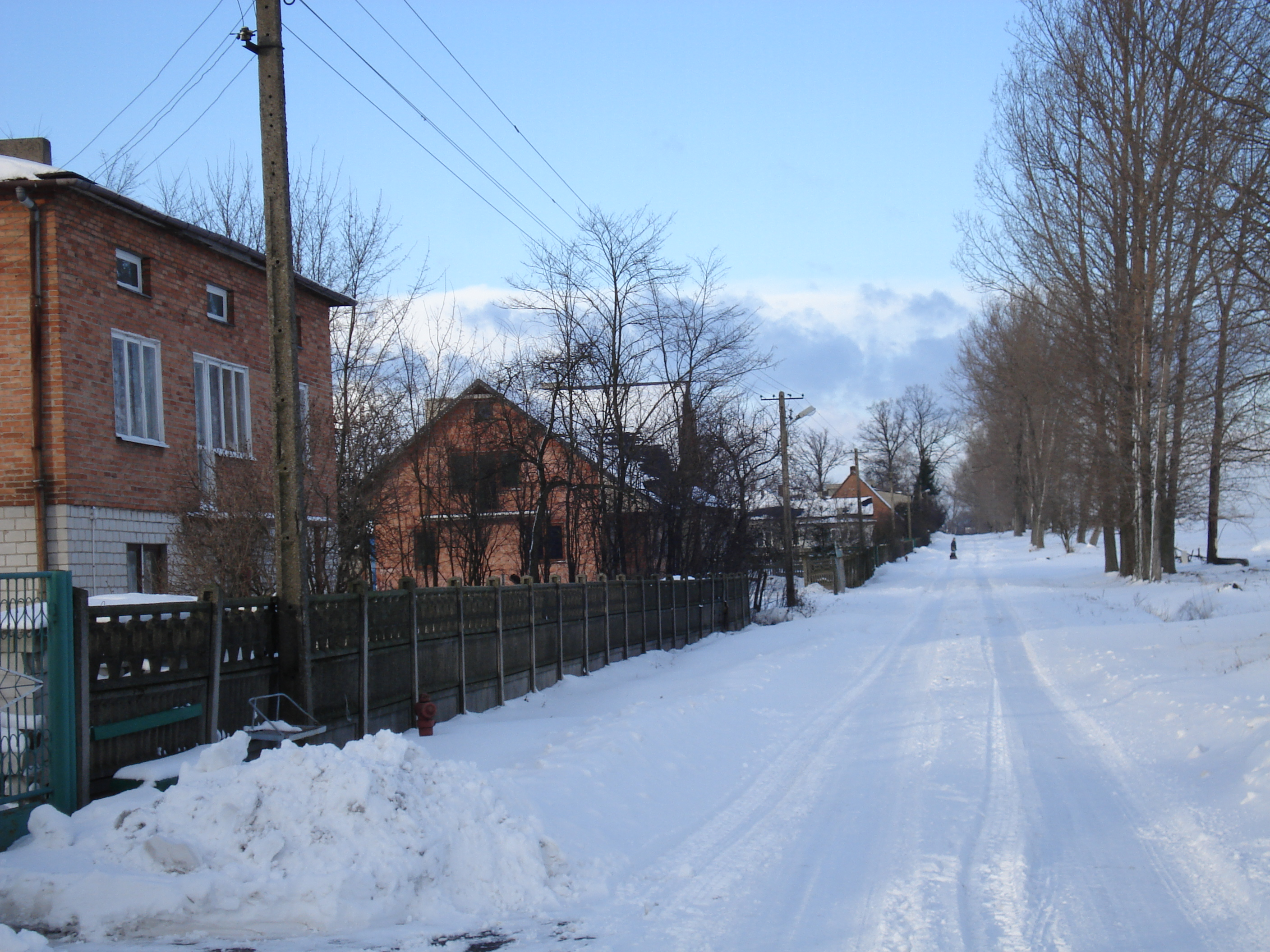 Wieś Parądzice (gm. Wartkowice)